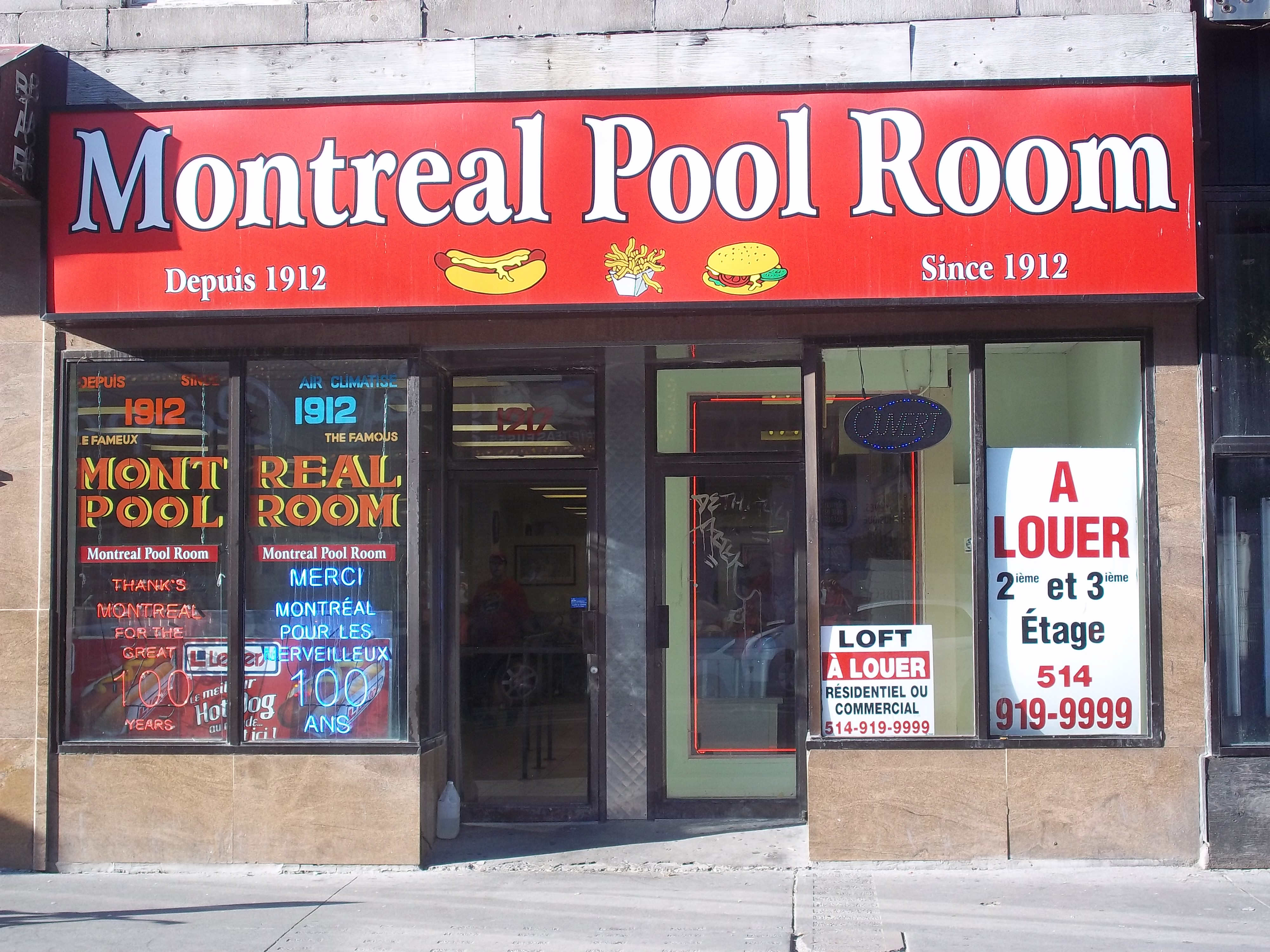 Façade du Montreal Pool Room, boulevard Saint-Laurent, Montréal